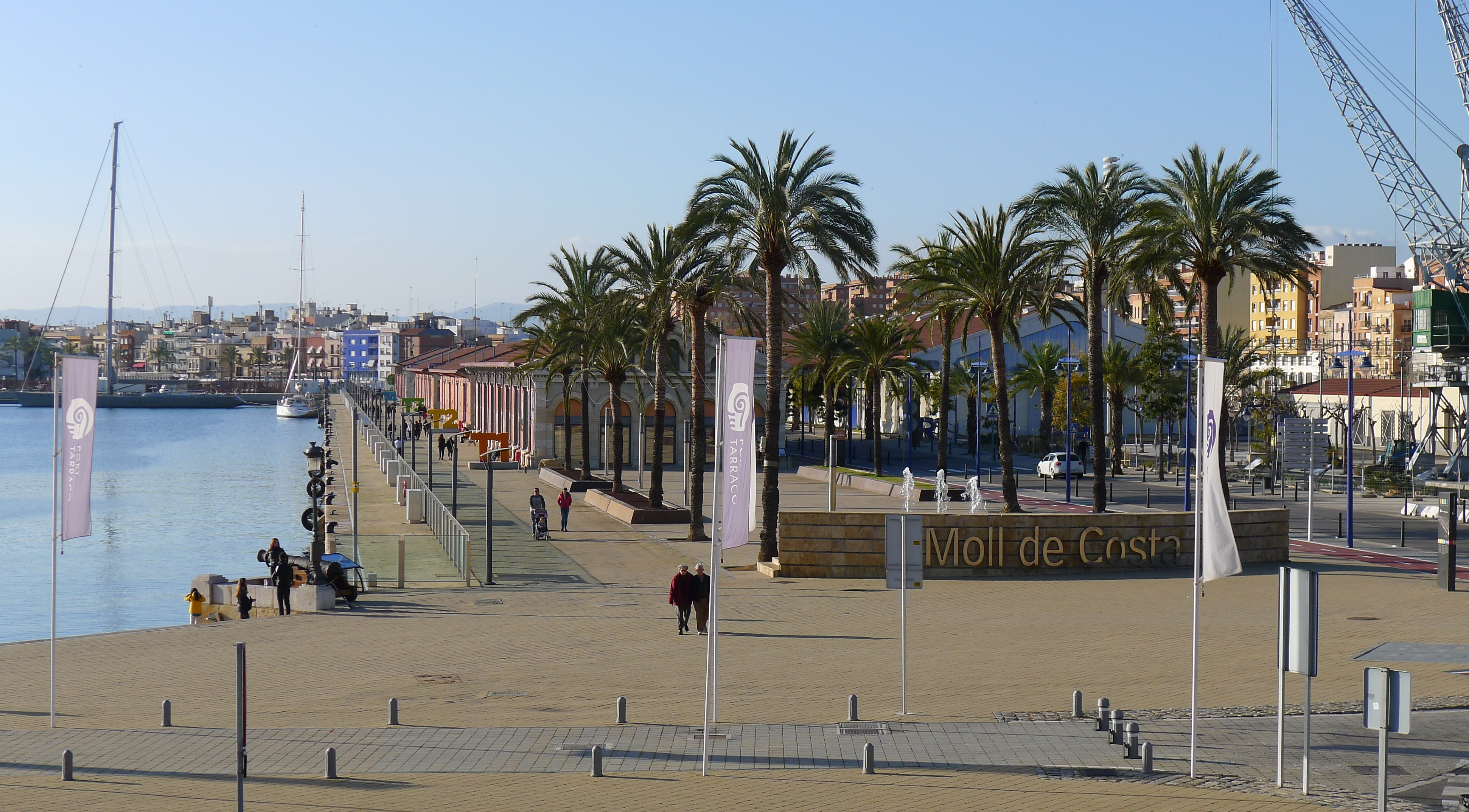 Moll de Costa, Bereich am nördlichen Kai des alten Hafenbeckens, jetzt Yachthafen, mit vier historischen Lagerhäusern (tinglados); 2018